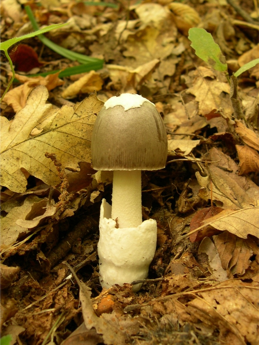 Amanita mairei Foley 1949